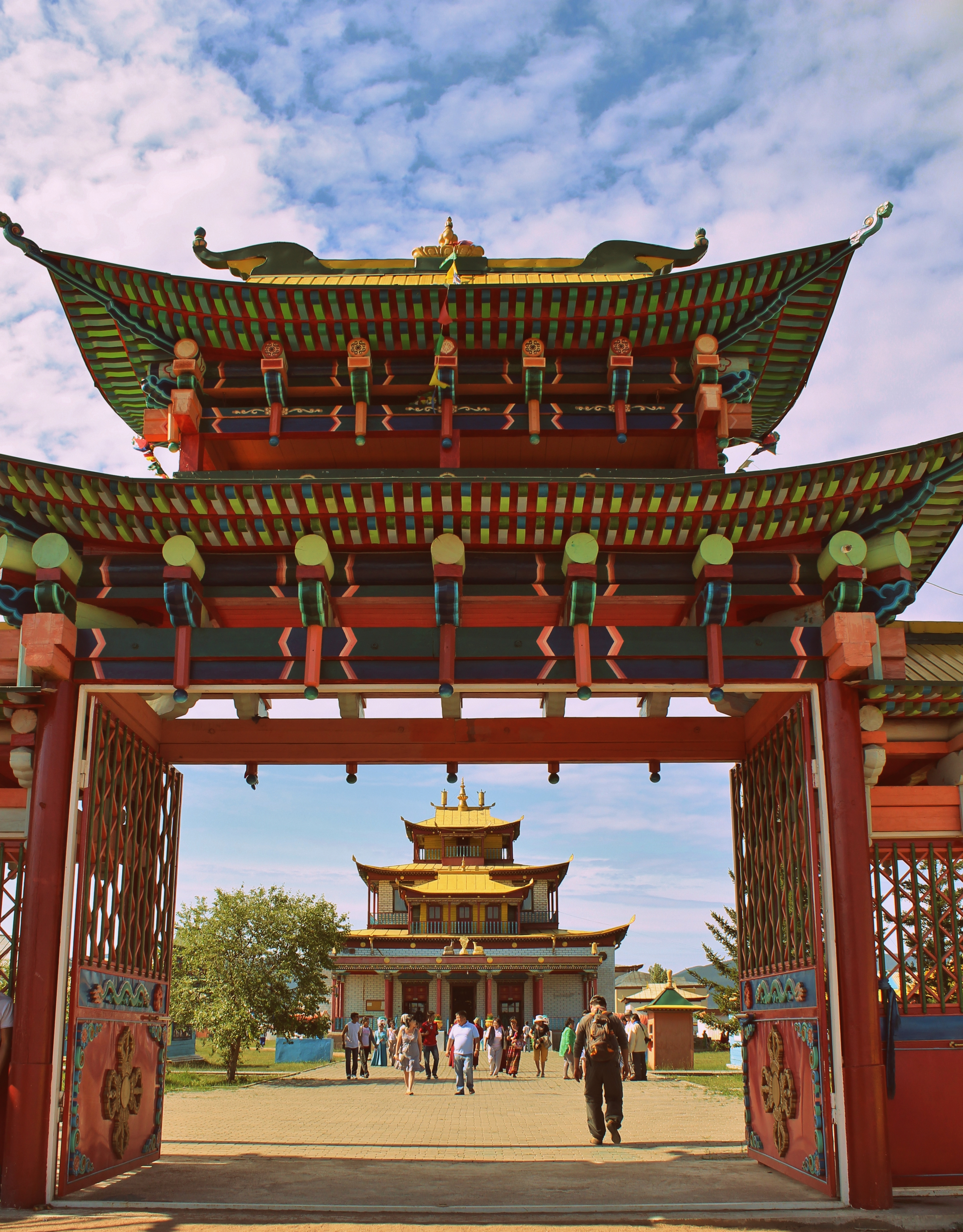 Главные ворота Иволгинского дацана, Бурятия